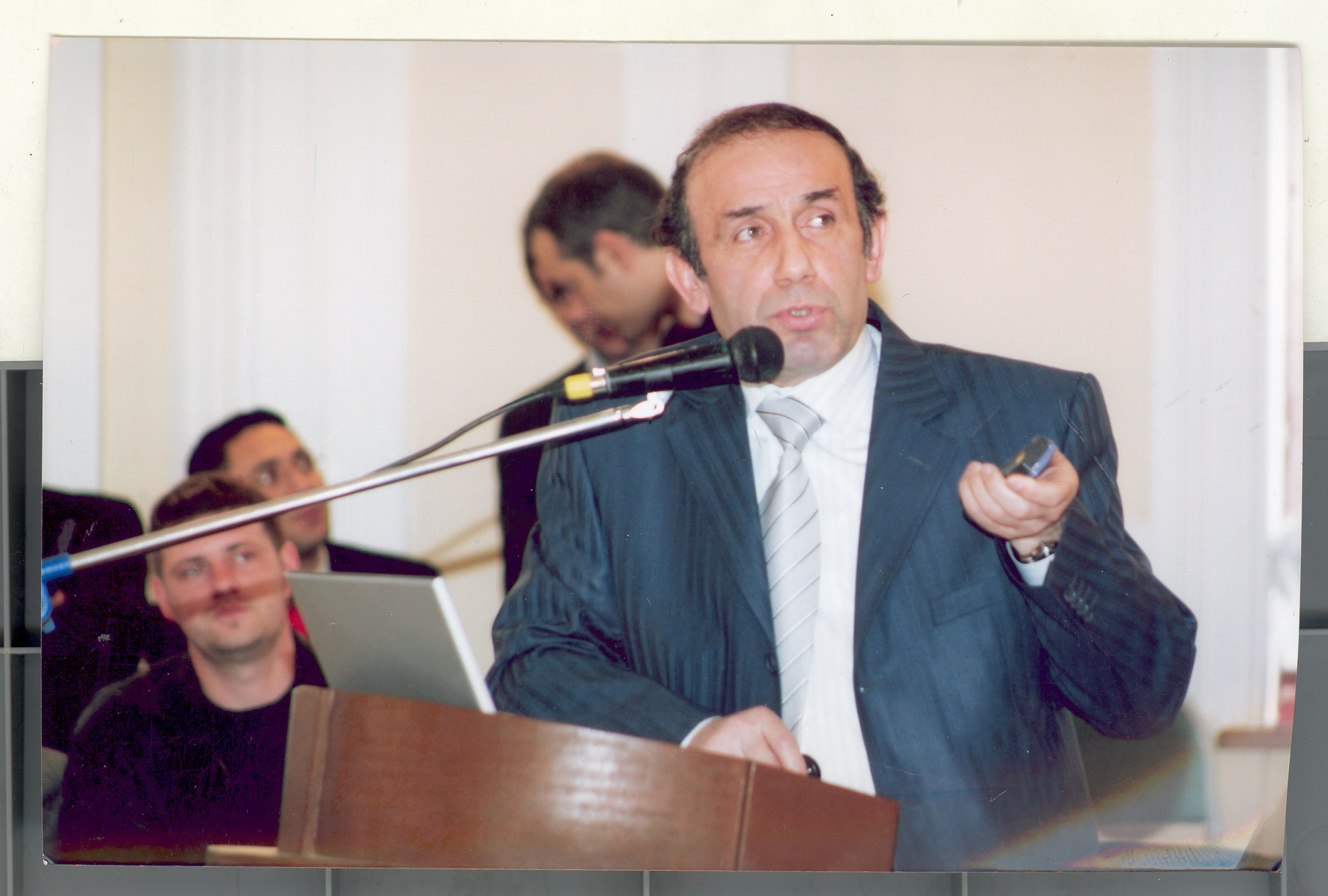 Çıxış edərkən